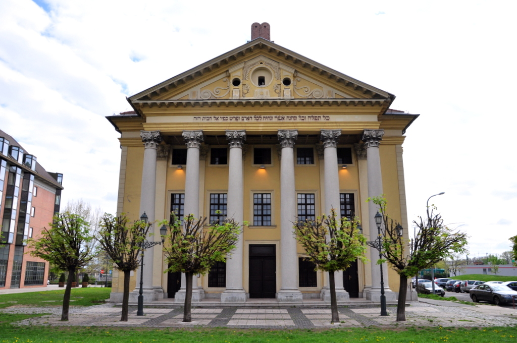 Óbuda Synagogue, Budapest District III